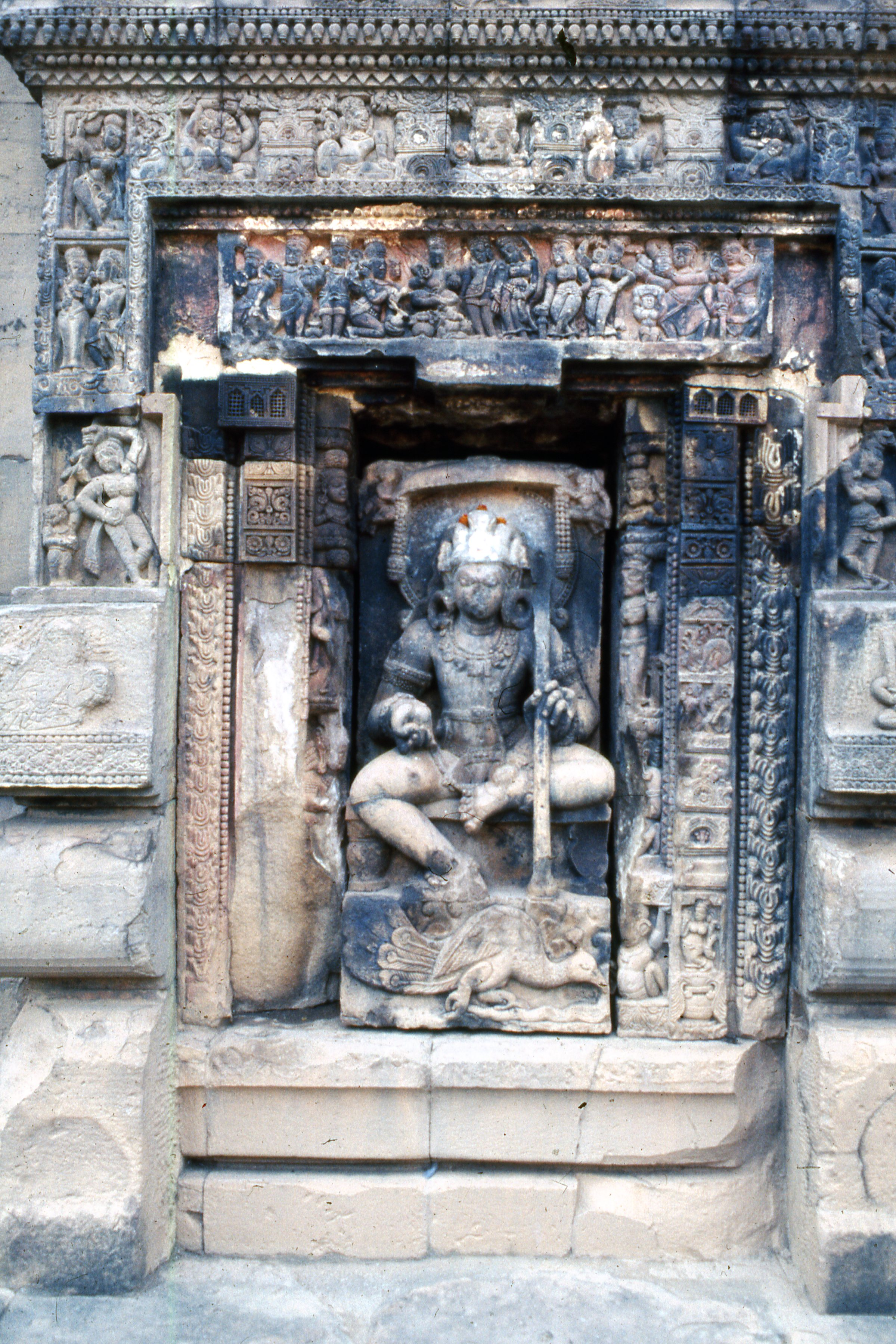 Orissa,Bhuvanesvar,Templo Vaital Deul/ Baitala Deula, siglo VIII u IX,escultura de Karttikeya sobre su montura de pavoreal, Shivaismo,Hinduismo